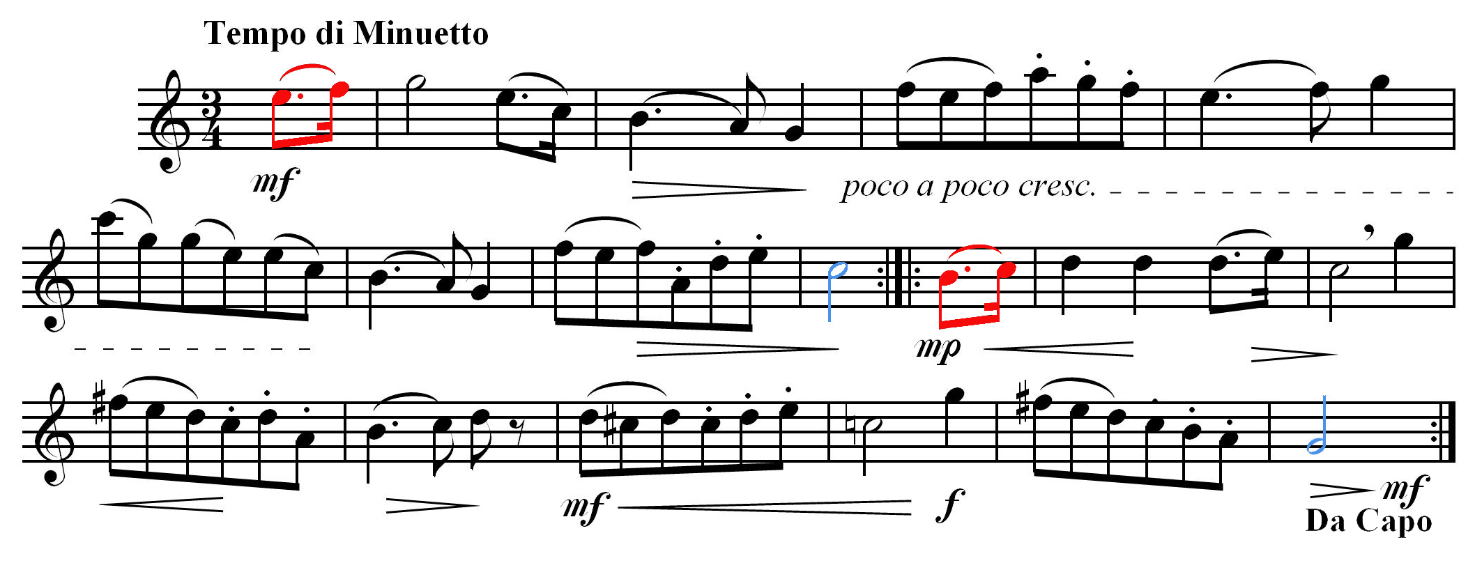 Srpskohrvatski / српскохрватски: Primer za predtakt